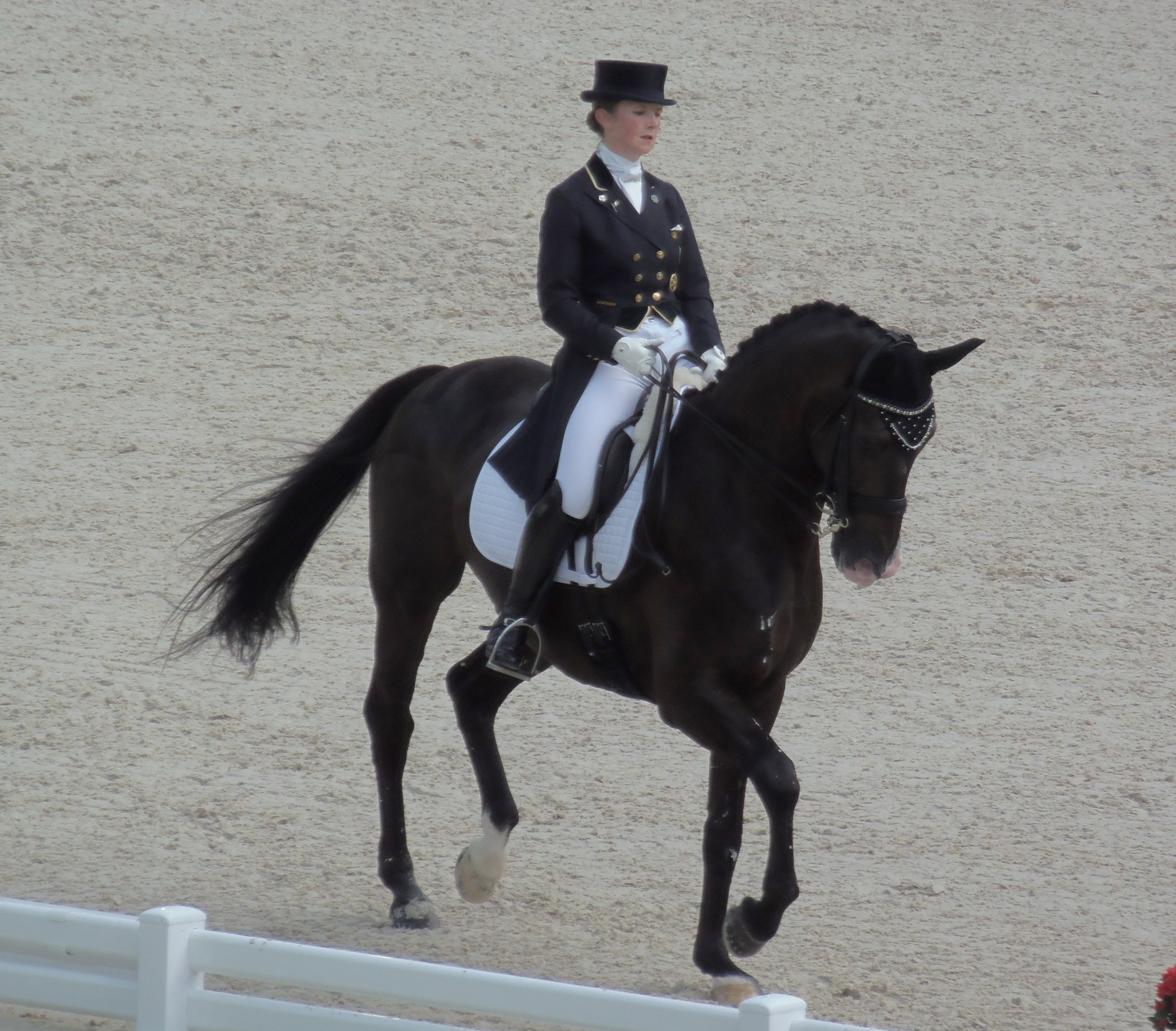 Judy Reynolds en selle sur Vancouver K lors des Jeux équestres mondiaux, le 26 août 2014 au stade d'Ornano à Caen (Normandie, France).